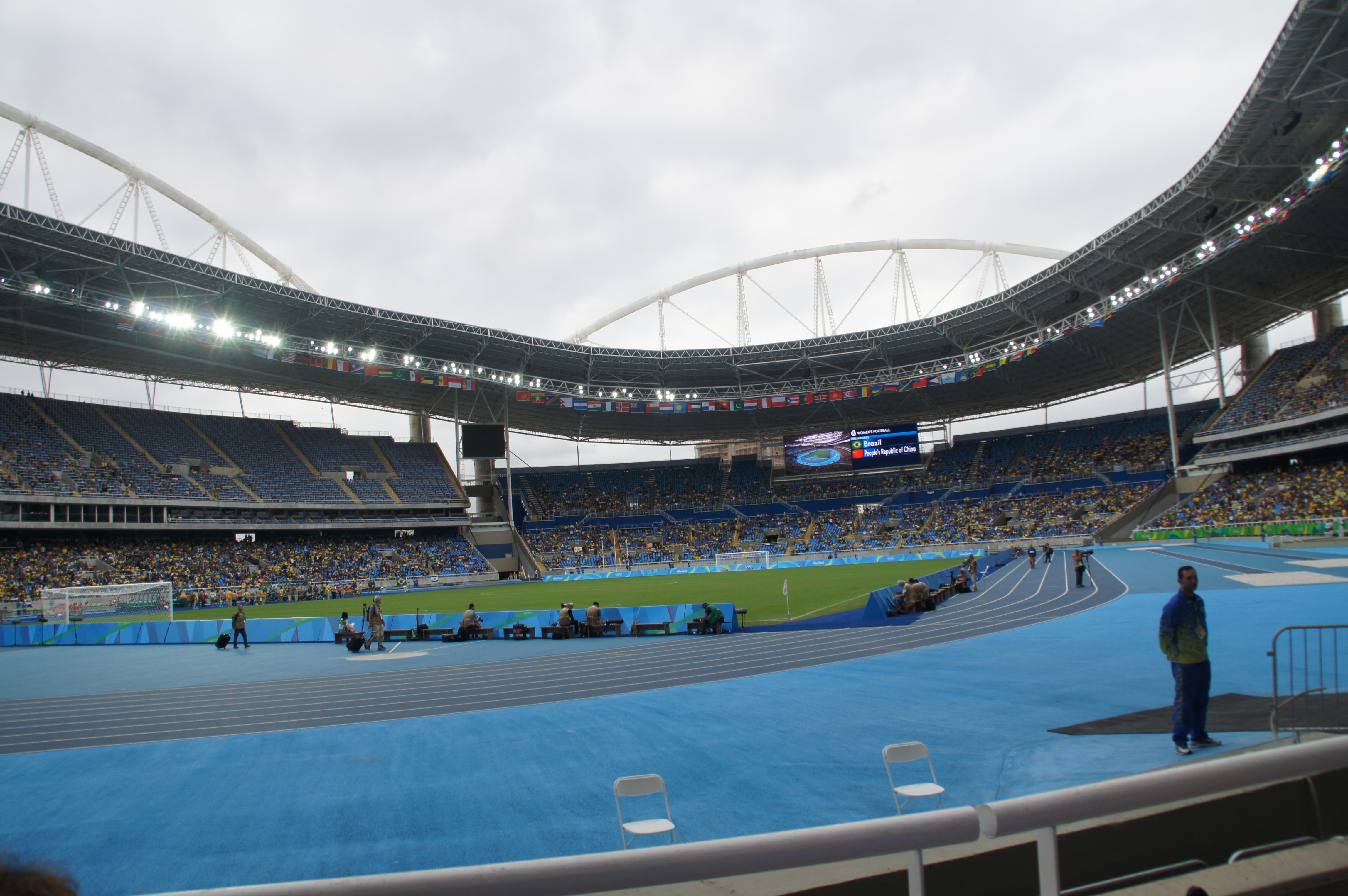 Futebol Feminino Brasil 3 x 0 China Rio 2016, Rio de Janeiro, Brasil. 03/08/16